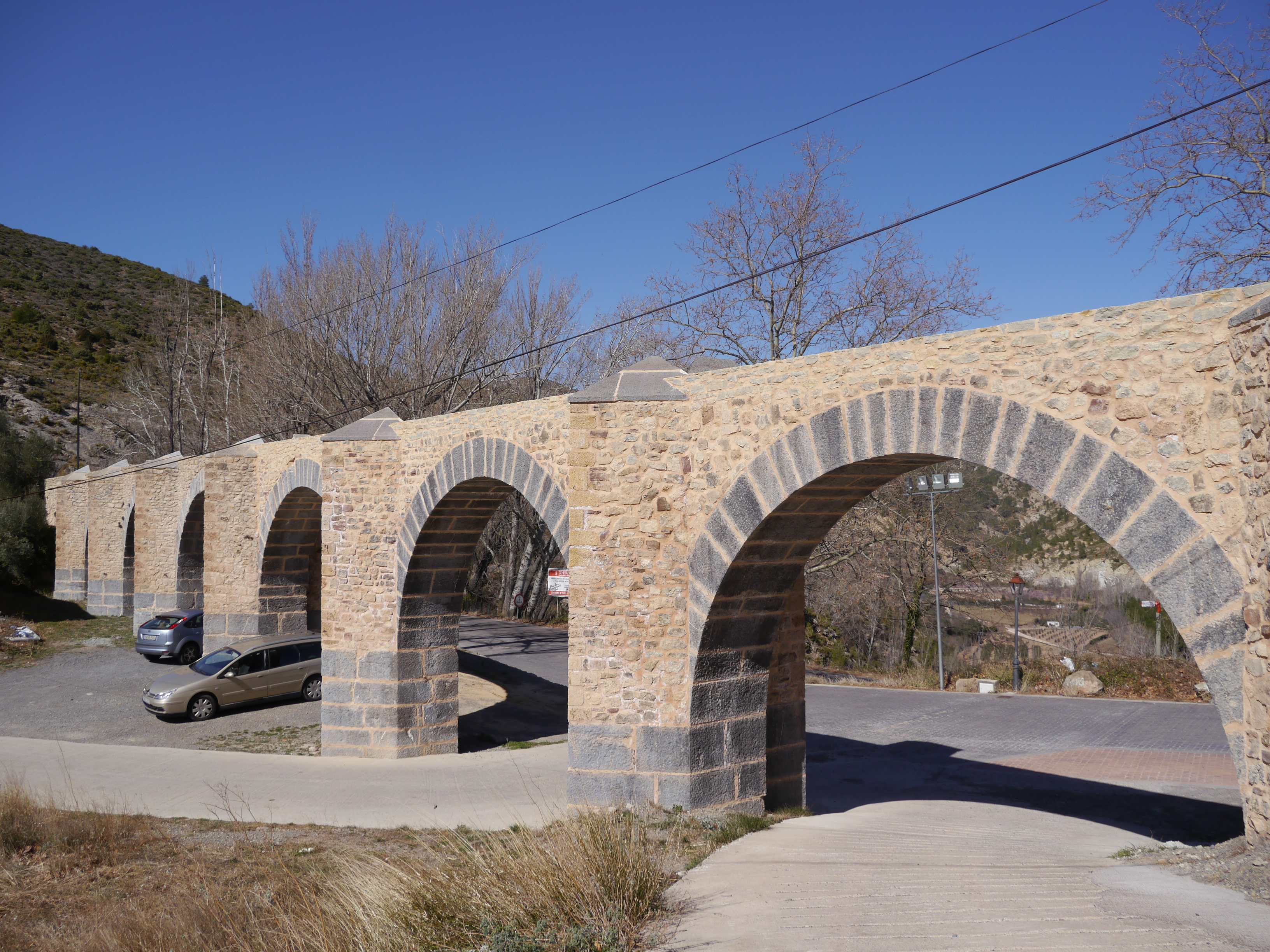 Acueducto de Bejís denominado también Acueducto Romano los Arcos